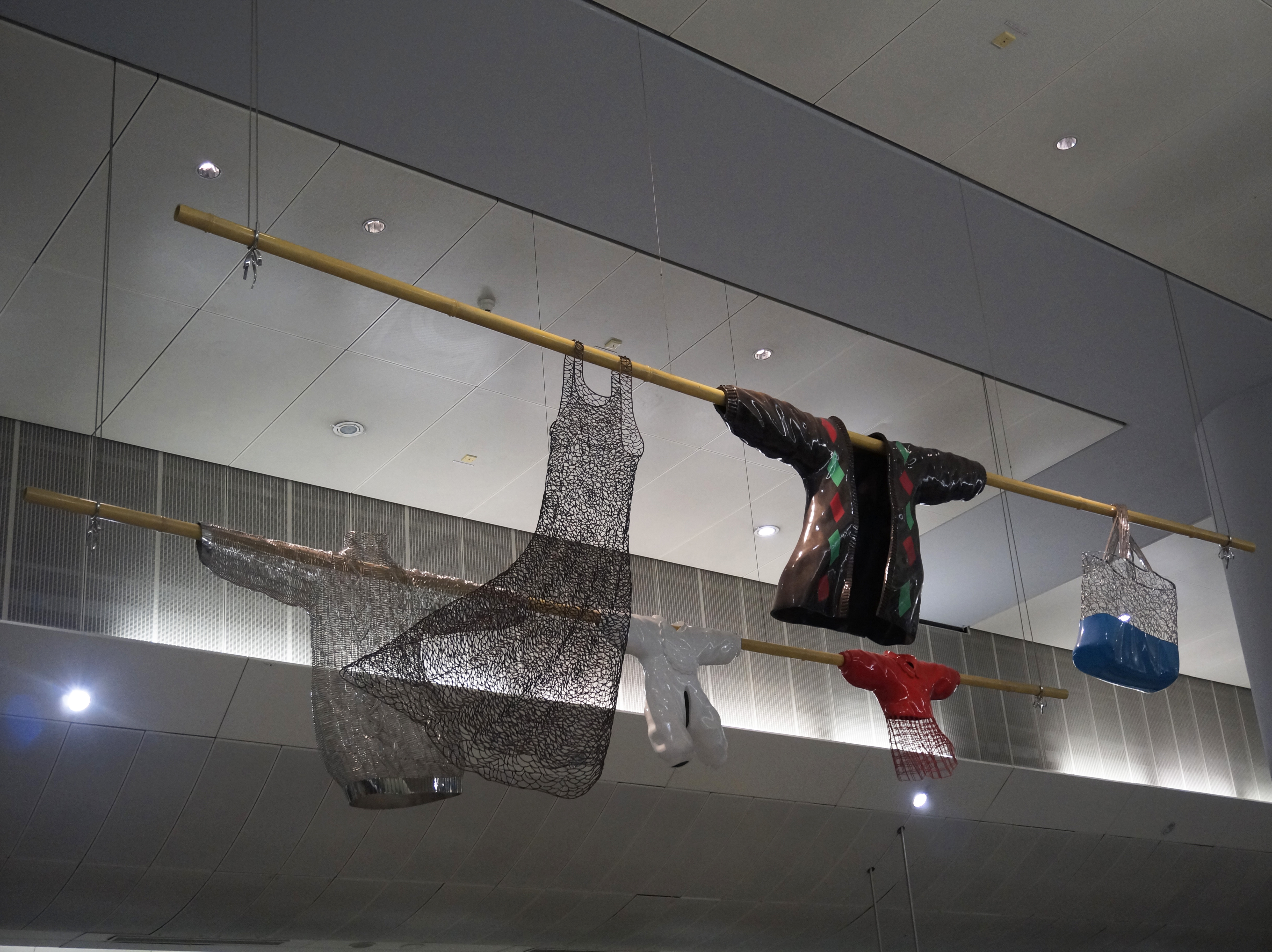 港鐵元朗站藝術品